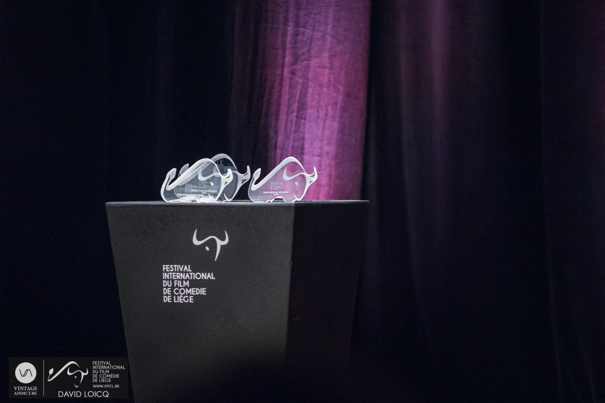 Crystal comedy award